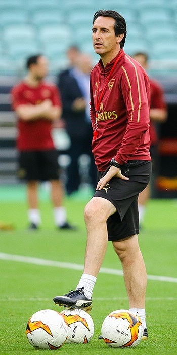 تمرین تیم فوتبال آرسنال پیش از فینال لیگ قهرمانان اروپا ۲۰۱۹